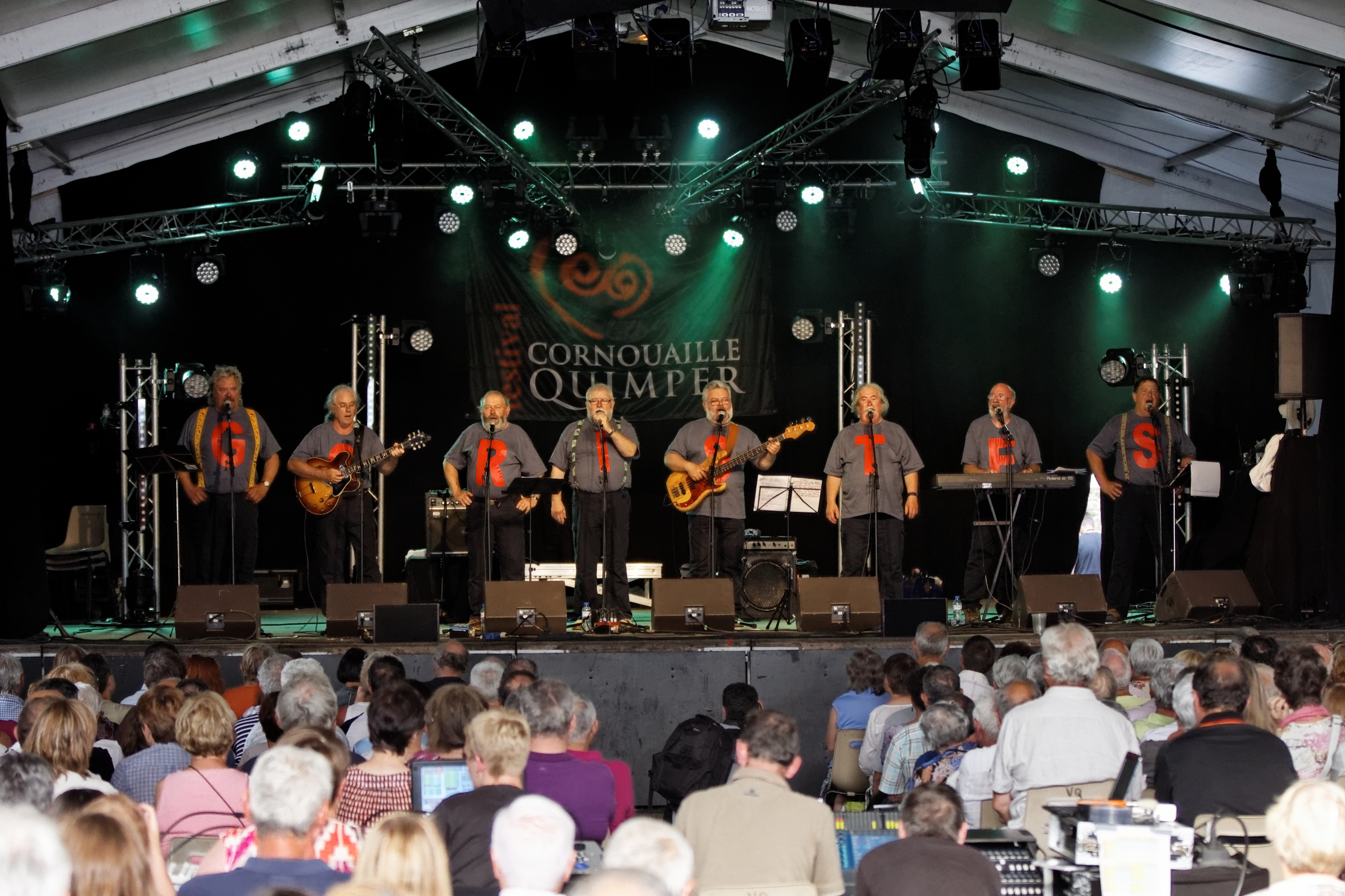 Les Goristes en concert sur la scène évêché lors du festival de Cornouaille 2012